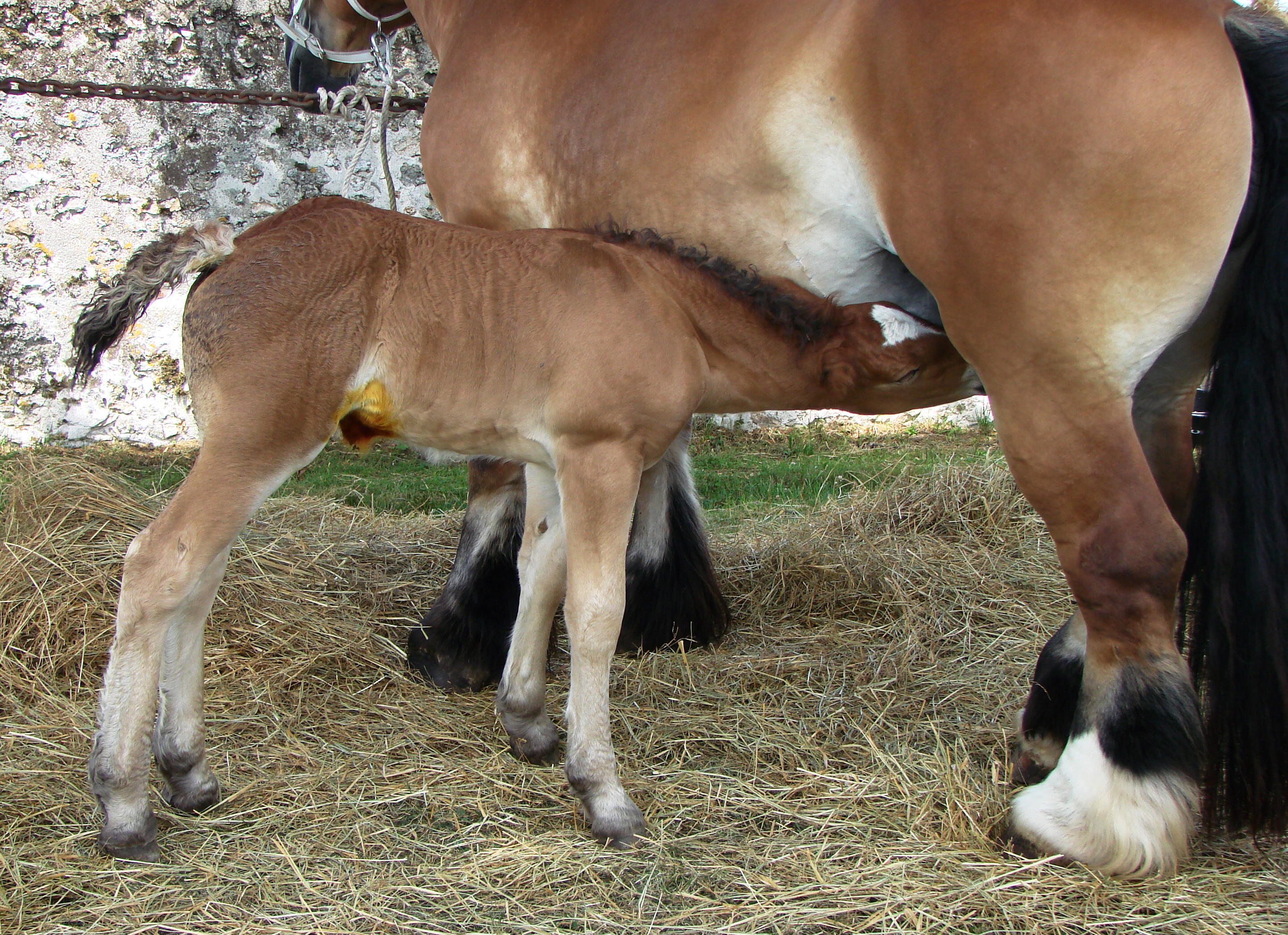 Très jeune poulain de race ardennaise, en train de têter sa mère.(On voit encore le désinfectant sous le ventre du poulain.)